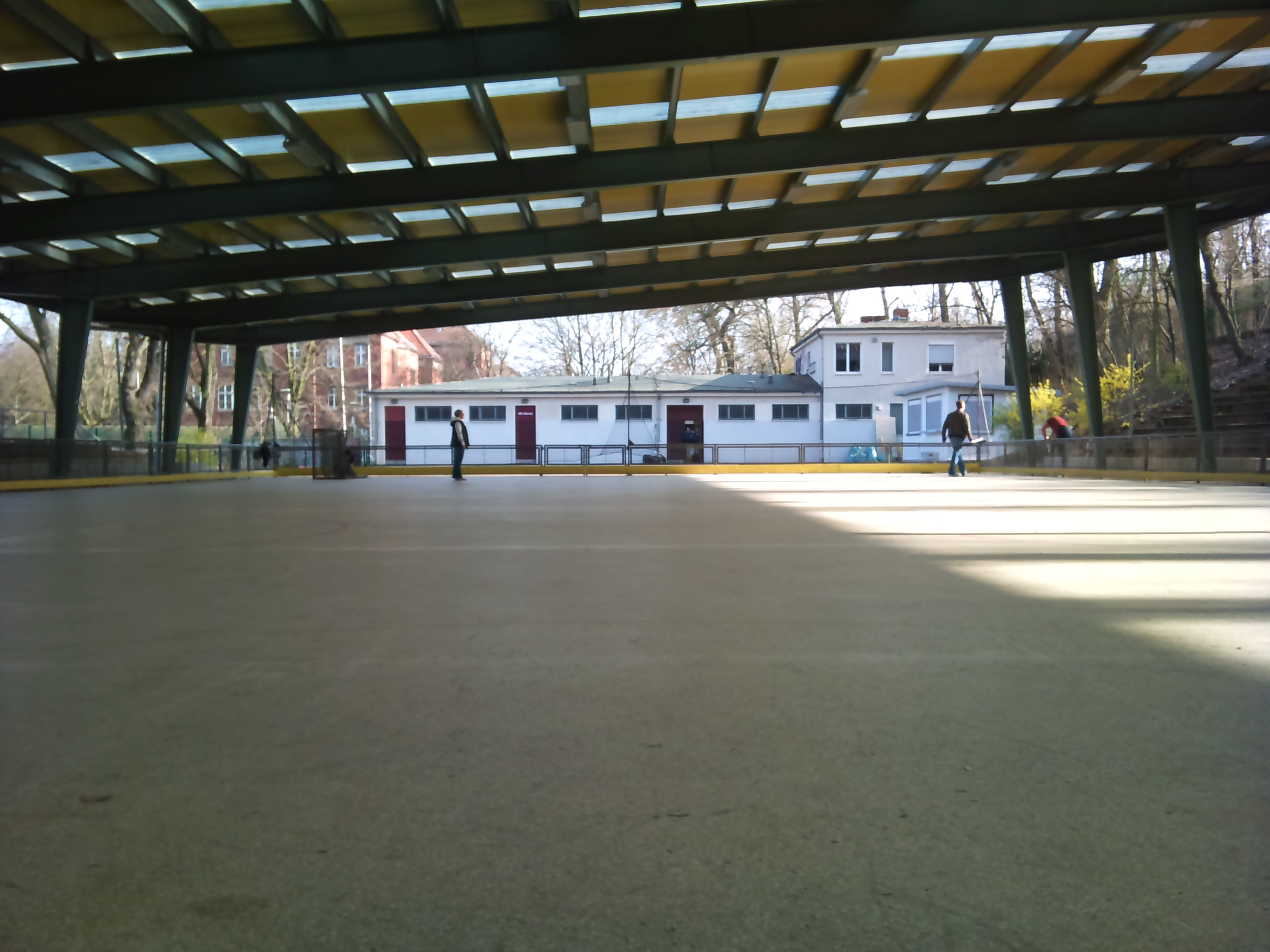 Erneuerte Rollschuhbahn mit Dach